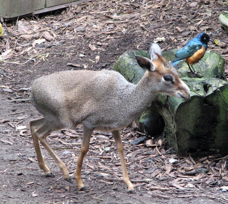 Madoqua guentheri & Lamprotornis superbus